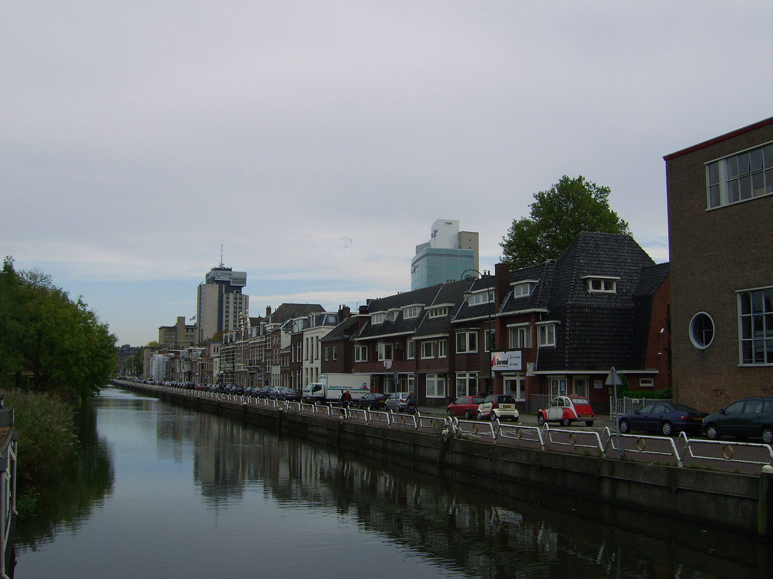 eigen werk Ruben Alexander